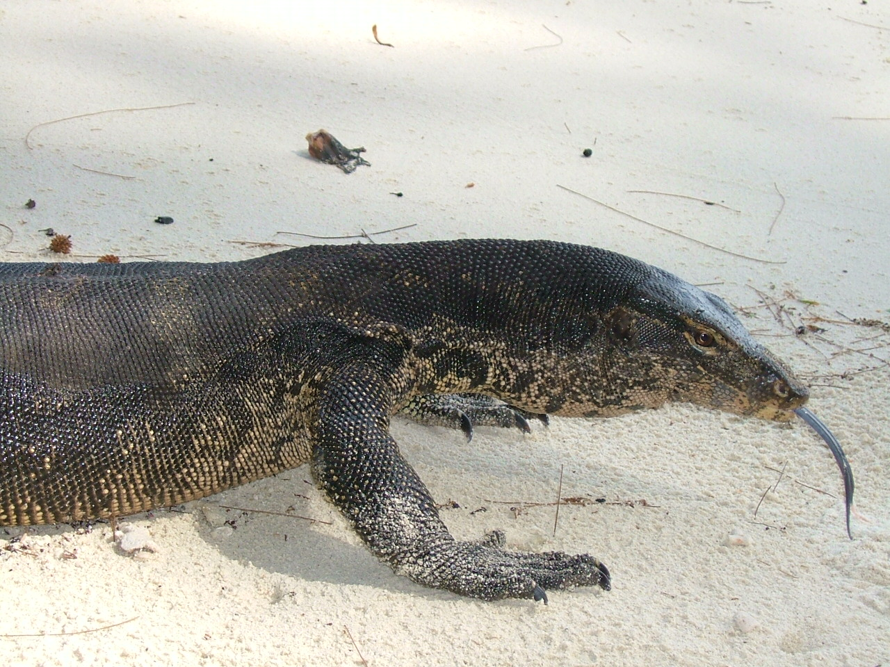 Varanus salvator (bahasa Indonesia: Biawak, ビアワッ) found in Sepa Island beach, Kepulauan Seribu, Jakarta, Indonesia